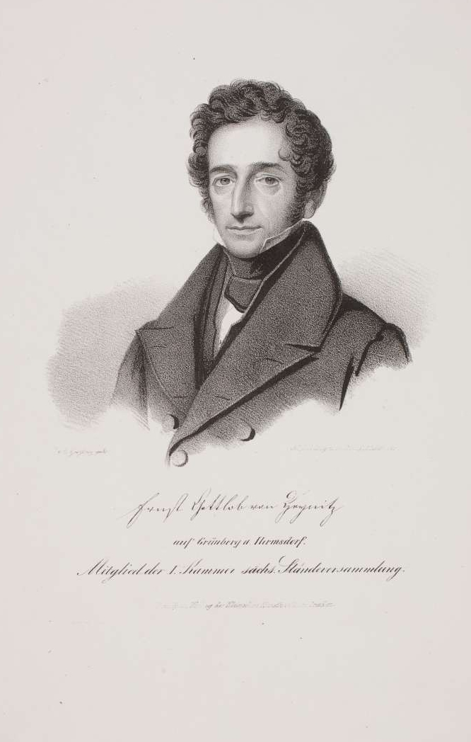 Herr auf Grünberg u. Hermsdorf; Abgeordneter der ersten Kammer der sächs. Ständeversammlung 1833/34; Präsident des Hauptmissionsvereins, 1801-1861